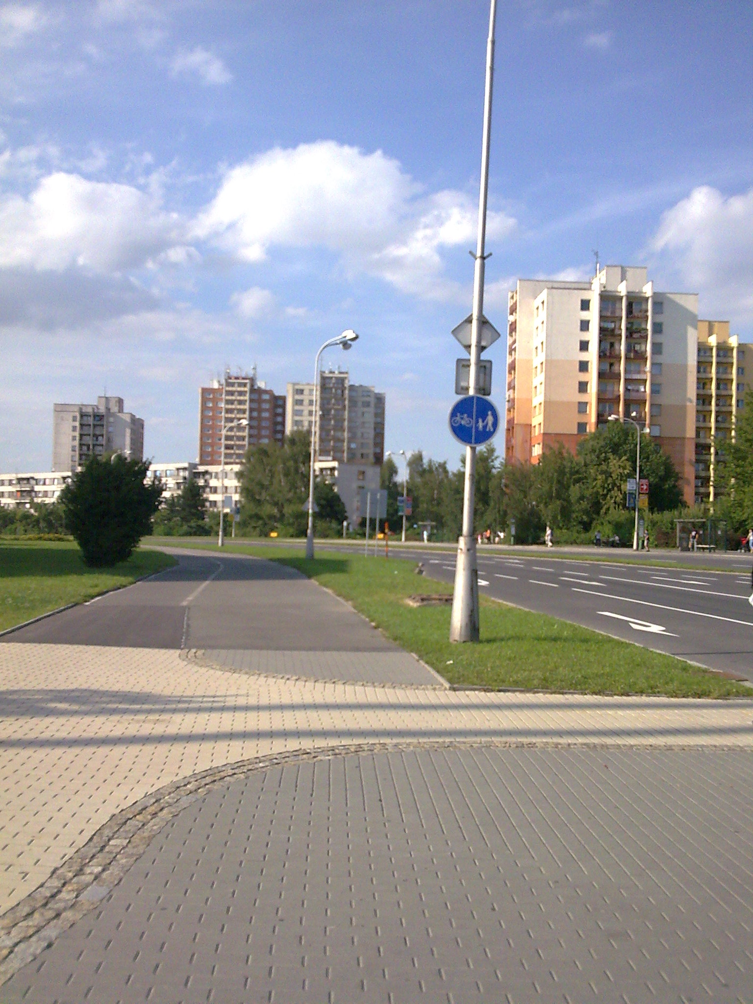 ul. 17 Listopadu w Karvinie